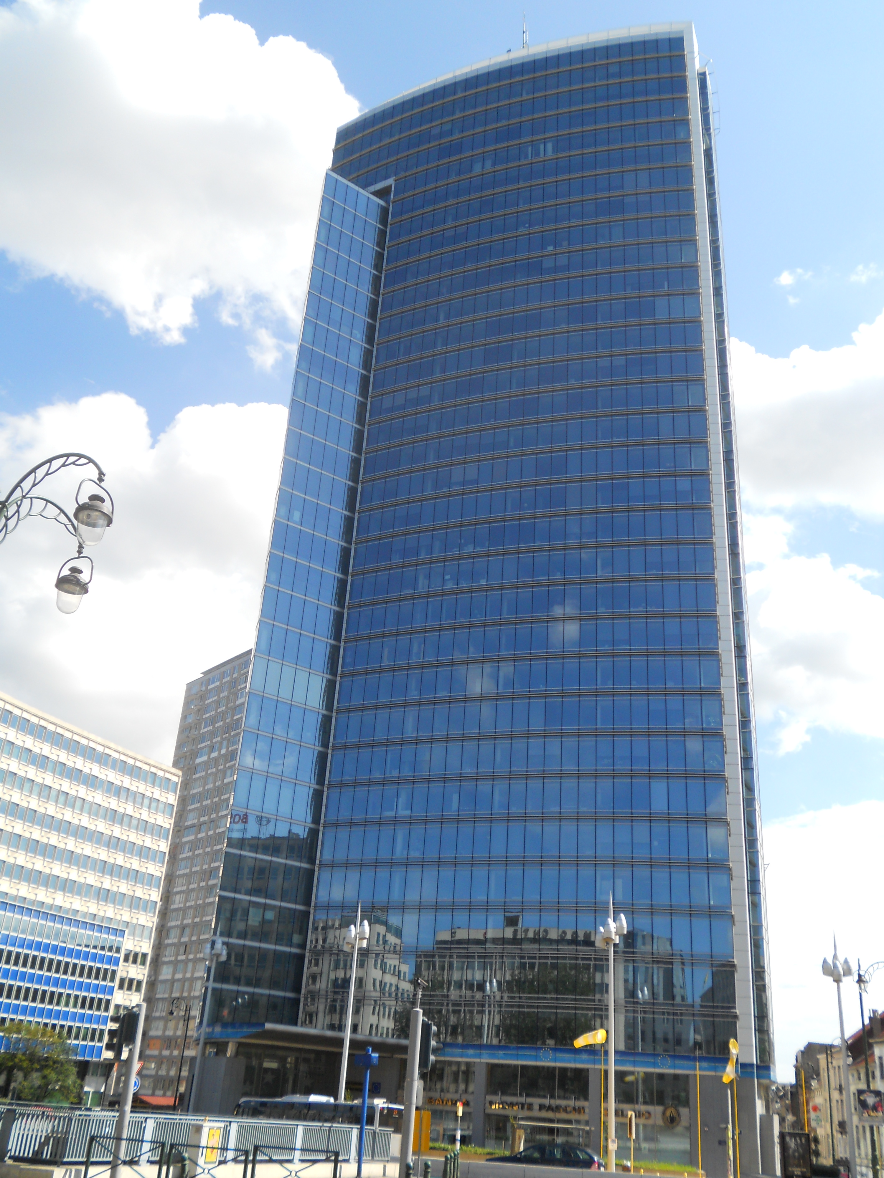 Gebäude der Generaldirektion Bildung und Kultur, Verwaltungseinheit der Europäischen Kommission